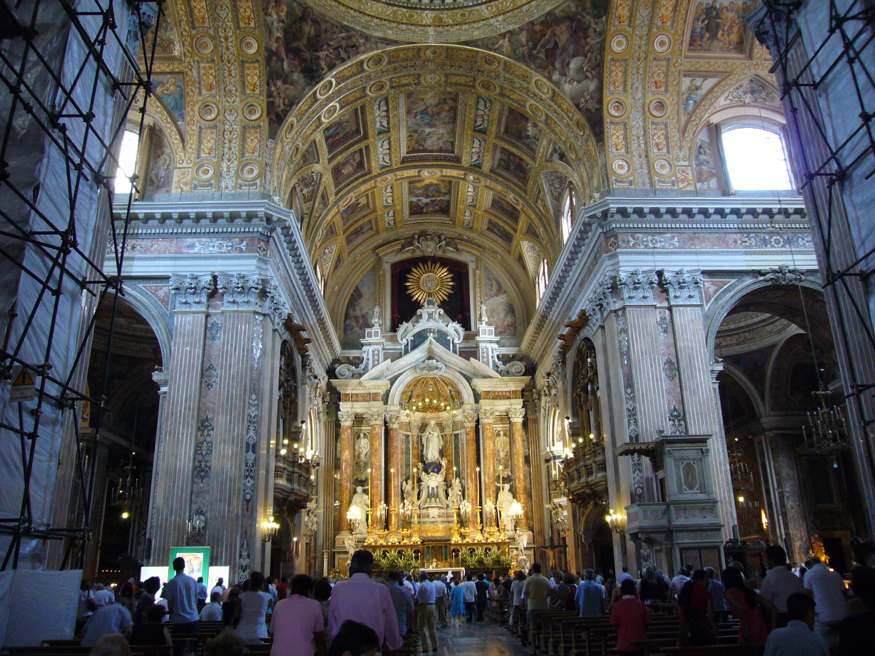 Napoli, Messa al Gesù Nuovo